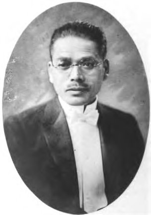 南慎一郎（1885-1965）